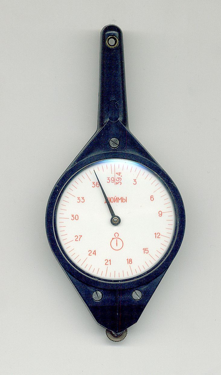 Krzywomierz- przyrząd do pomiaru długości linii krzywych